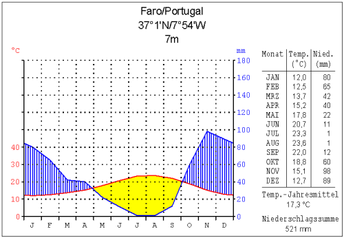 Klimadiagramm von Faro, Portugal